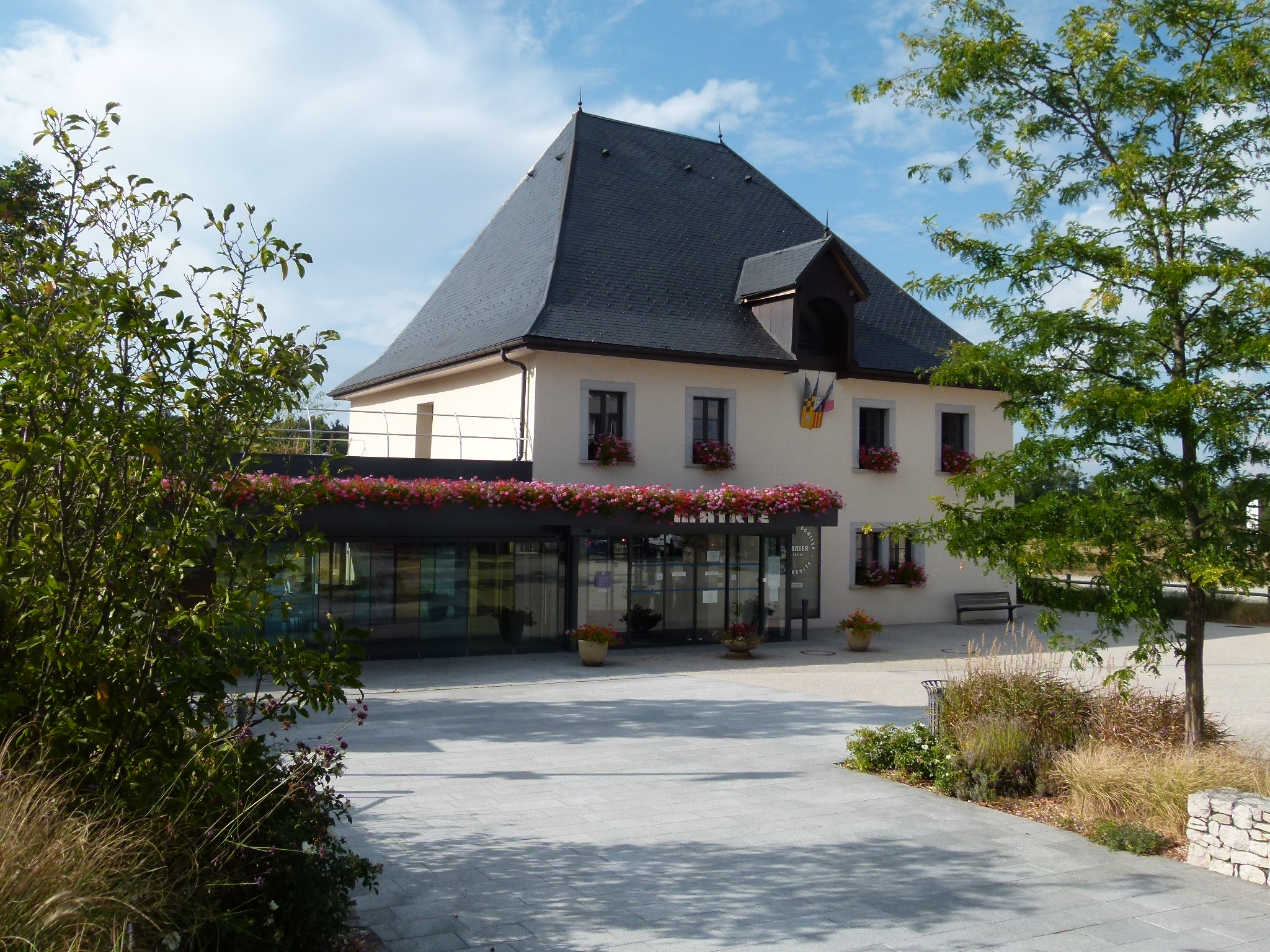 Mairie de CORNIER 74800 Place du Tilleul